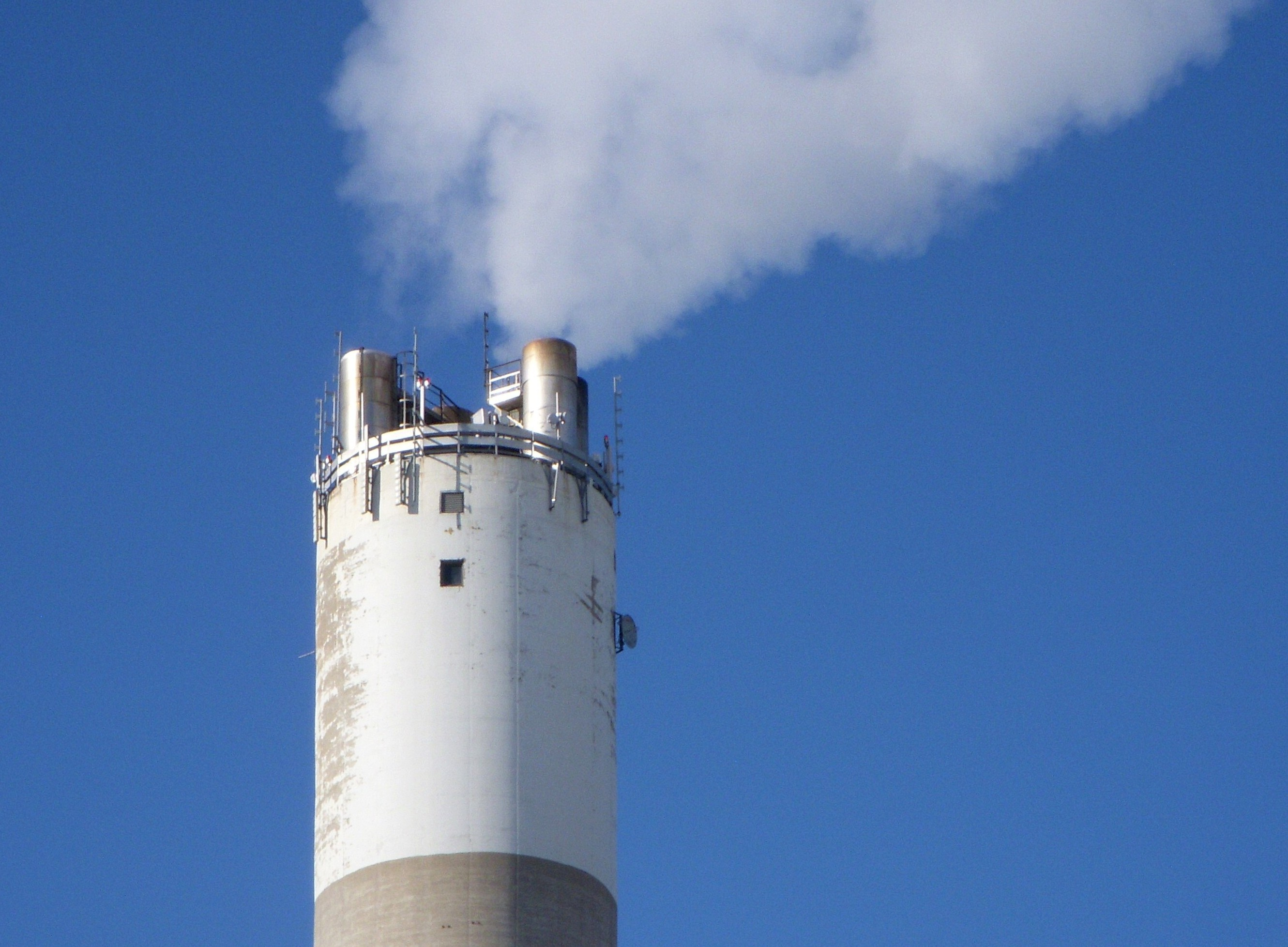 Högdalenverkets skorstenstopp